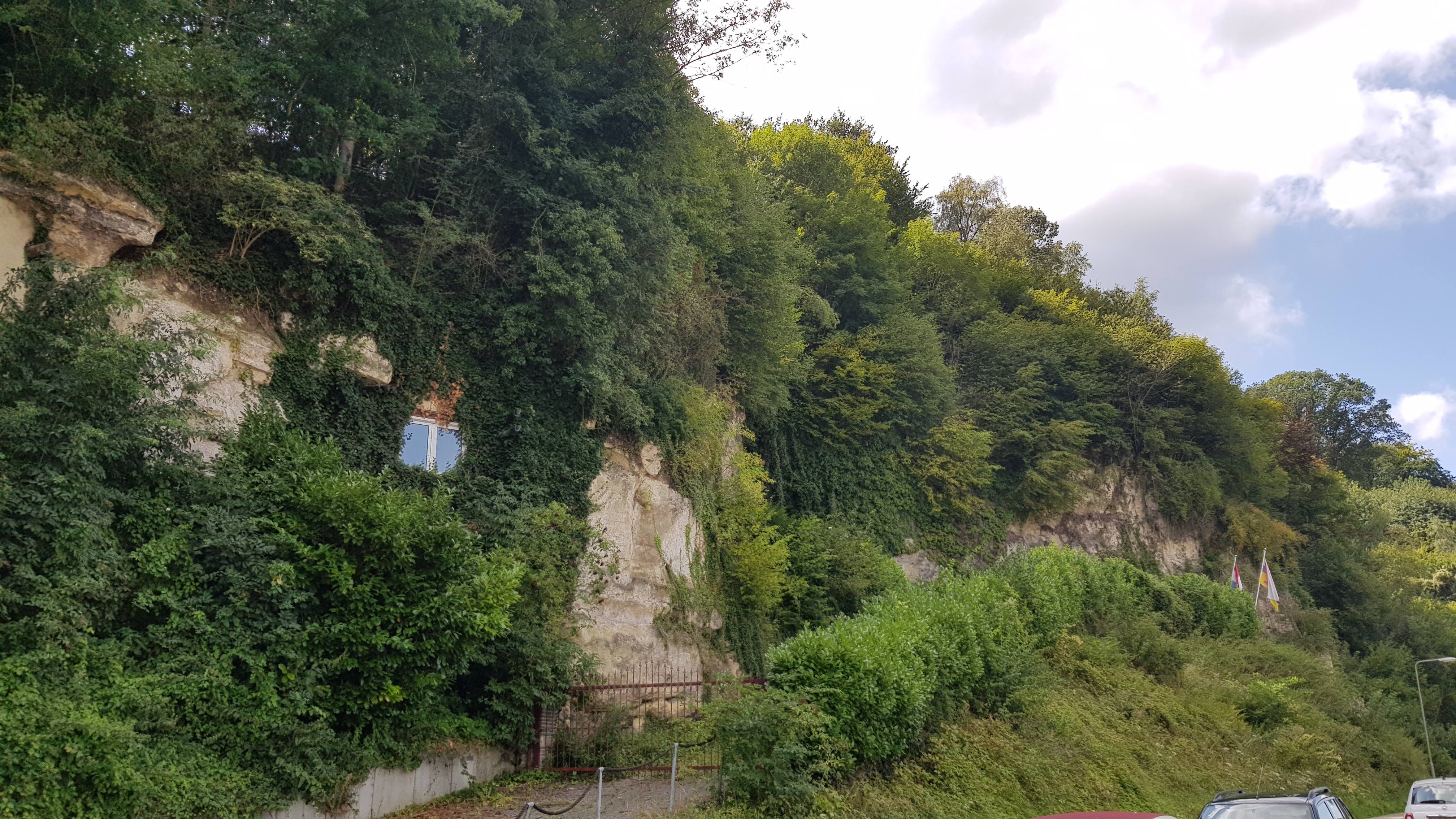 Studentengroeve, Geulhem, Nederland